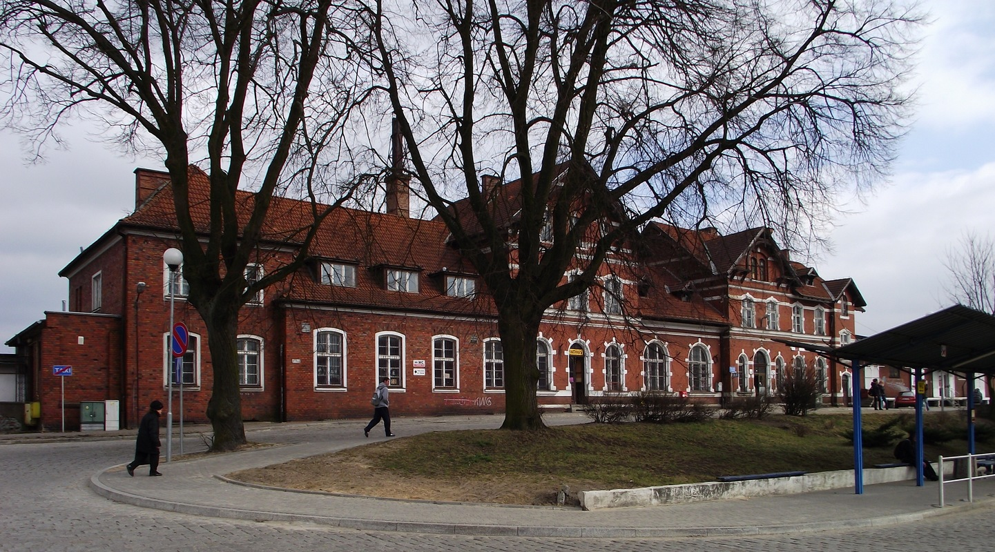 Wałcz, budynek główny, 1881